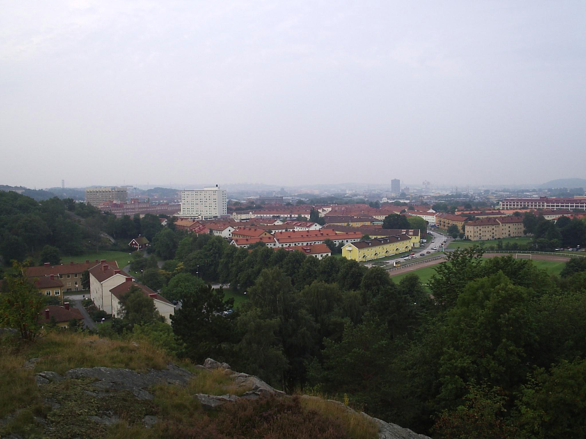 Vy över Gamlestaden i Göteborg, den 7 september 2005. Bilden är fotograferad av Harri Blomberg.